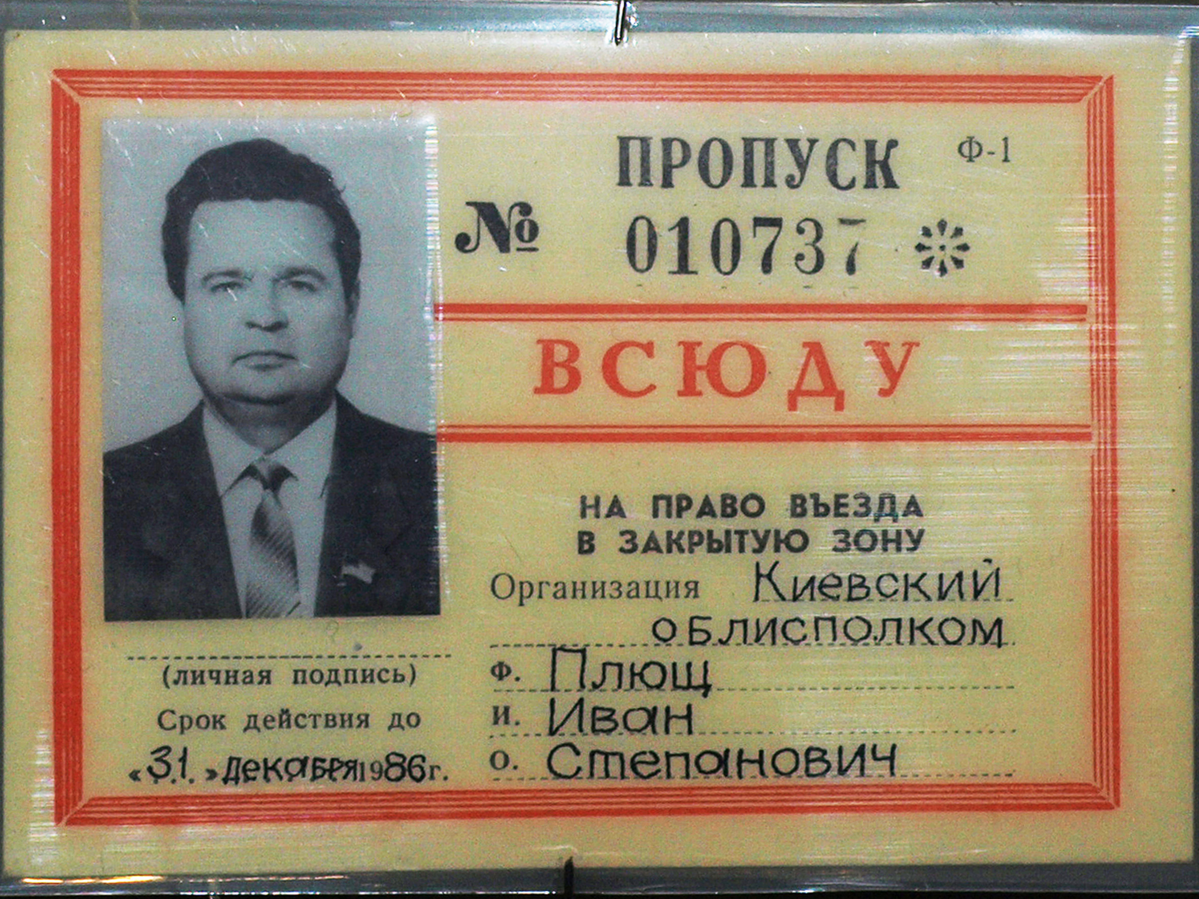 Перепустка в Чорнобиль Івана Плюща, голови Київського облвиконкому, начальника Цивільної оборони Київської області Національний музей «Чорнобиль»